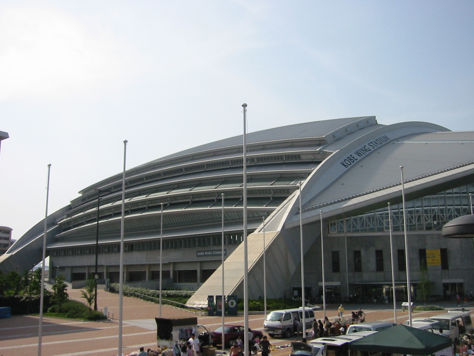 神戸ウイングスタジアム。